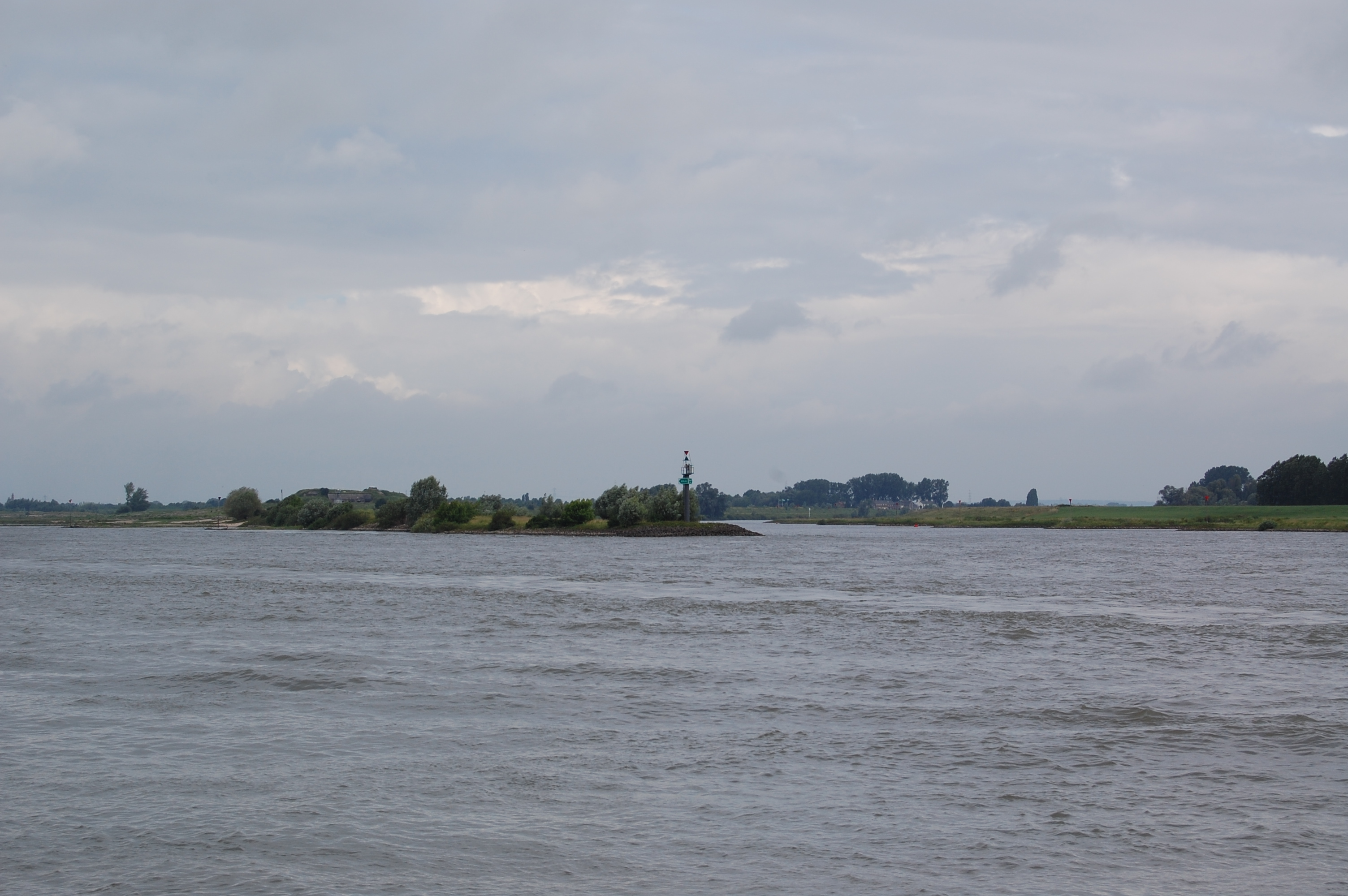 De kruising van de Rijn en het Pannerdens-kanaal tegenover Millingen aan de Rijn.